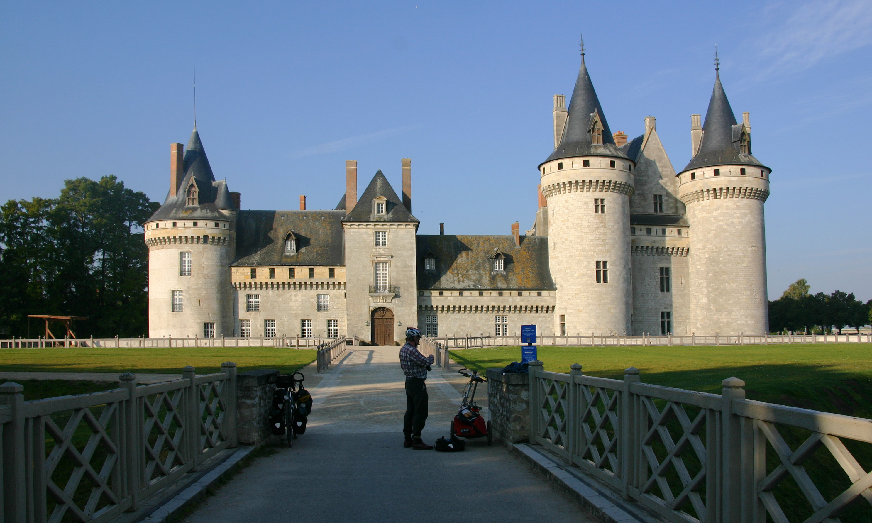 Schloss Sully-sur-Loire